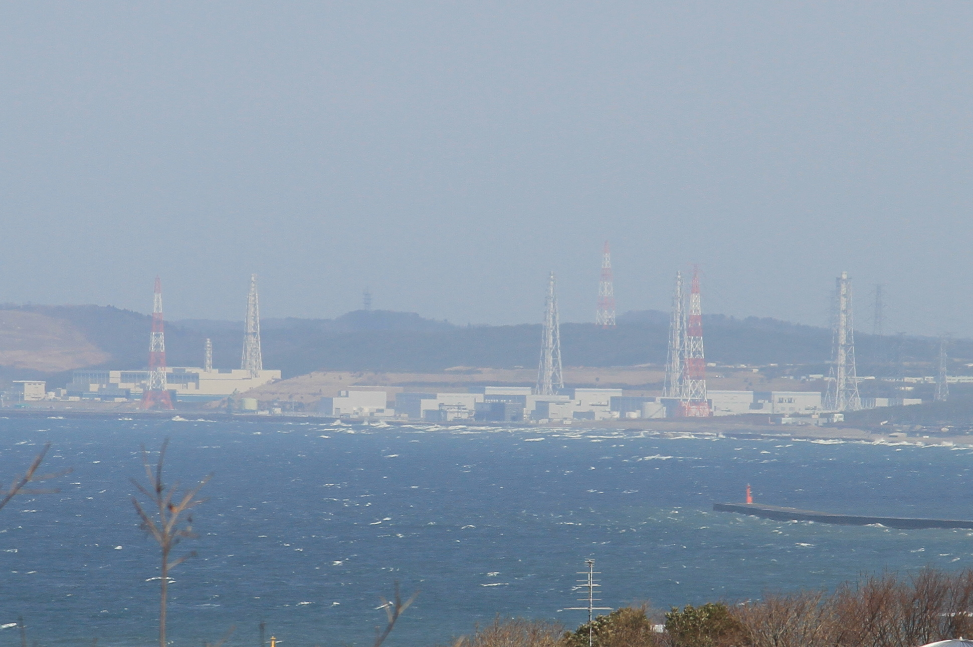 Kujiranami, Kashiwazaki, Niigata Prefecture 945-0855, Japan